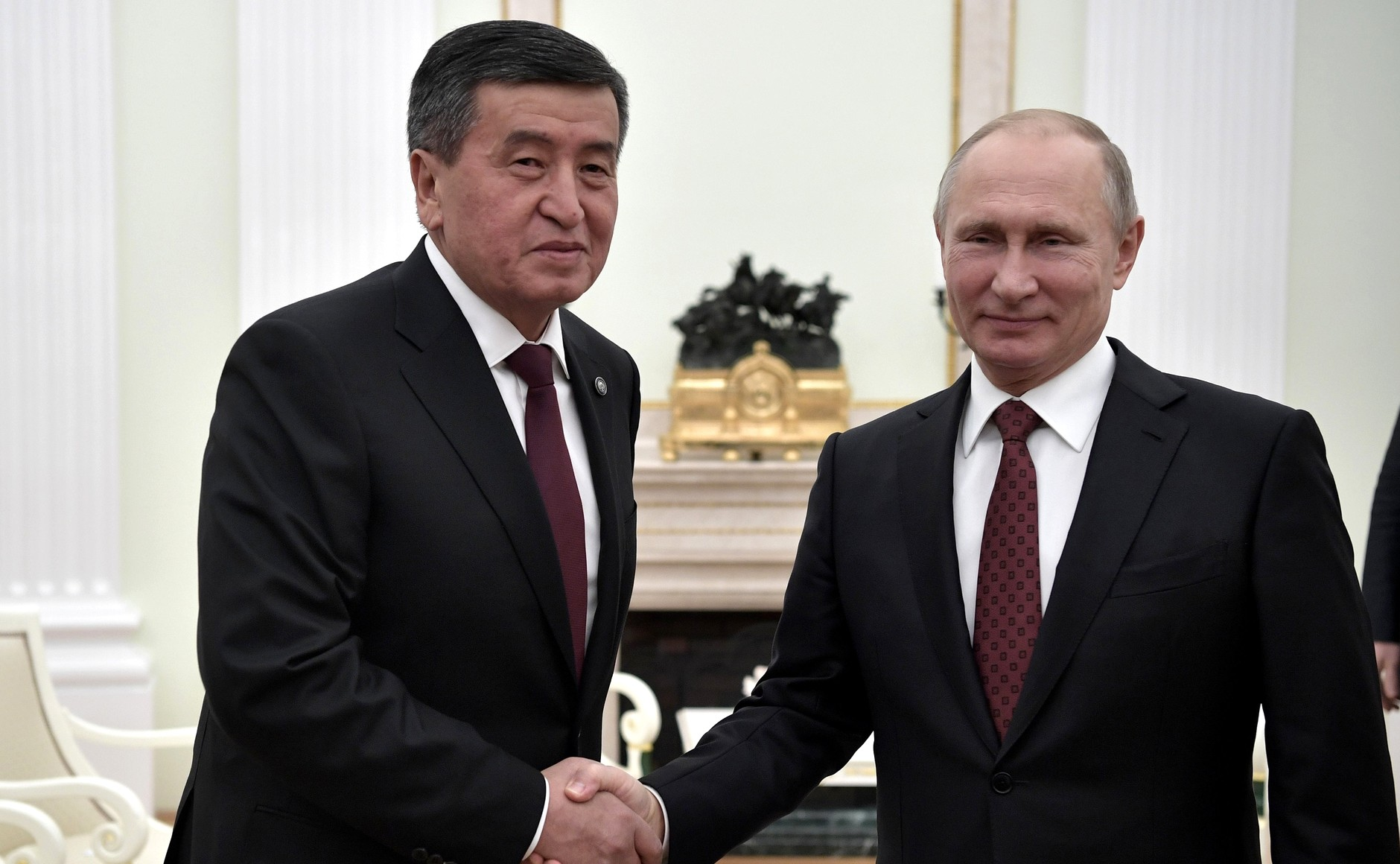 Президент России Владимир Путин с Президентом Киргизской Республики Сооронбаем Жээнбековым